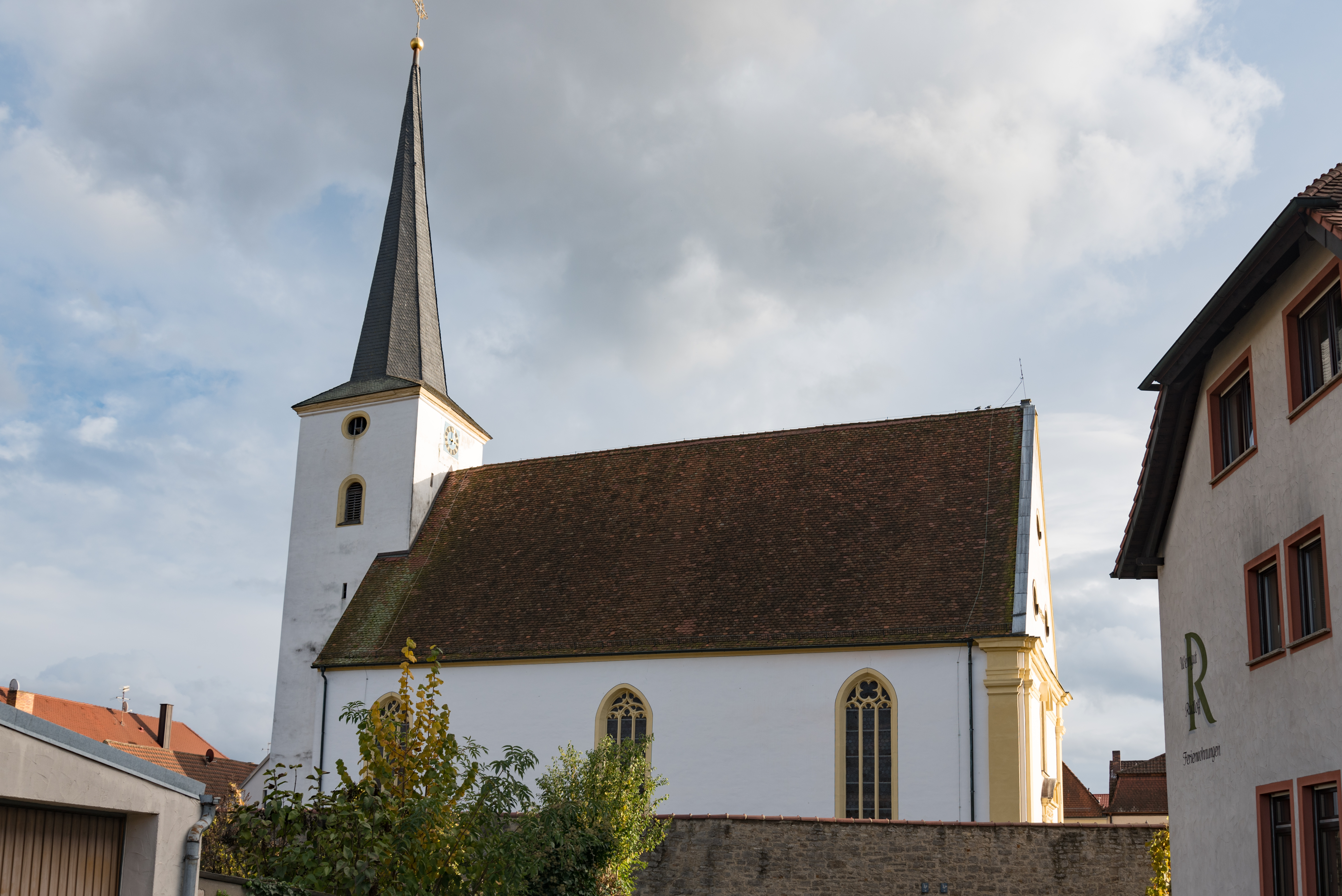 Nordheim am Main, Kirchplatz 2, Kath. Pfarrkirche